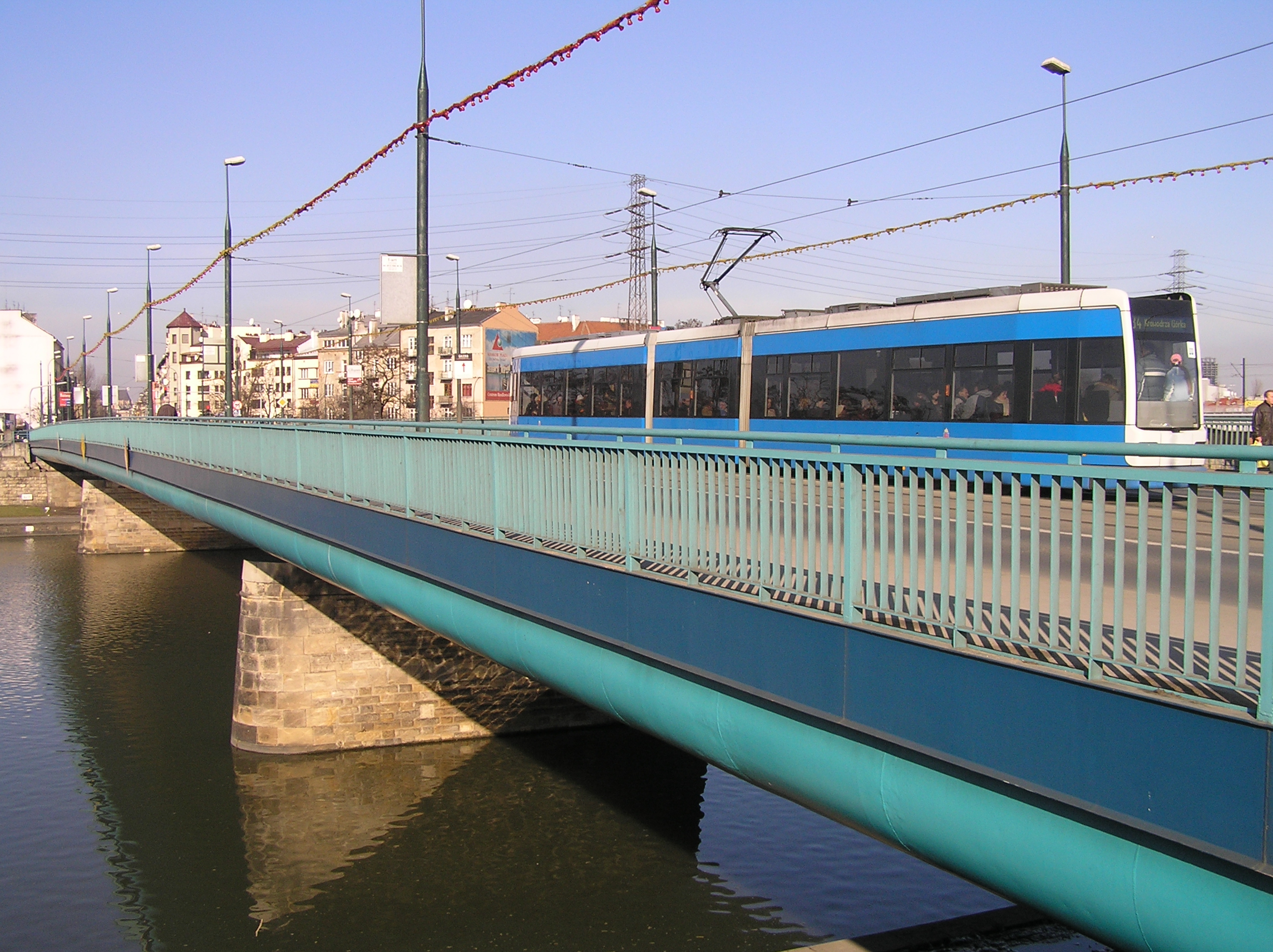 Most Powstańców Śląskich w Krakowie od strony Podgórza